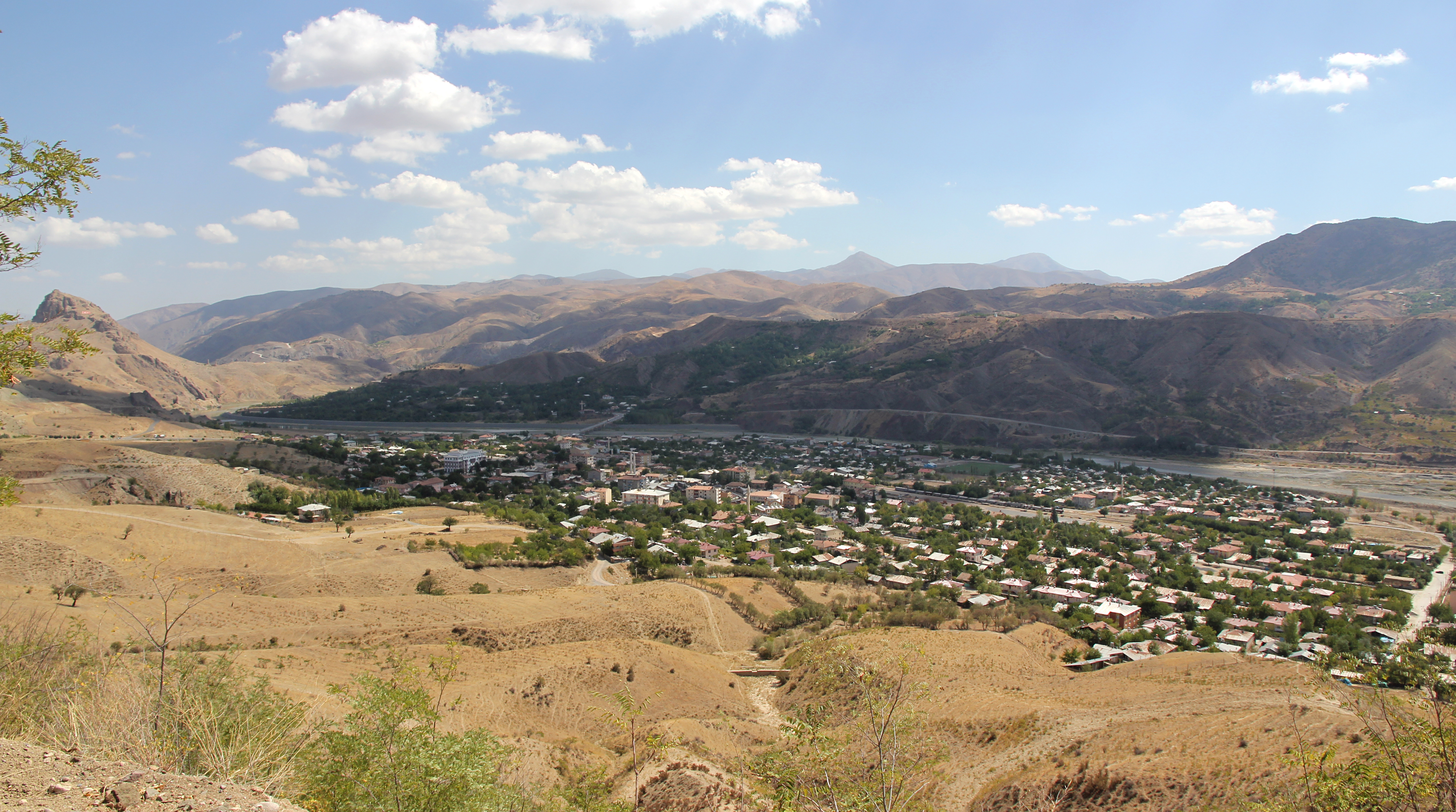 Palu, Provinz Elazığ, Türkei, von Nordwesten, mit dem Burgberg links